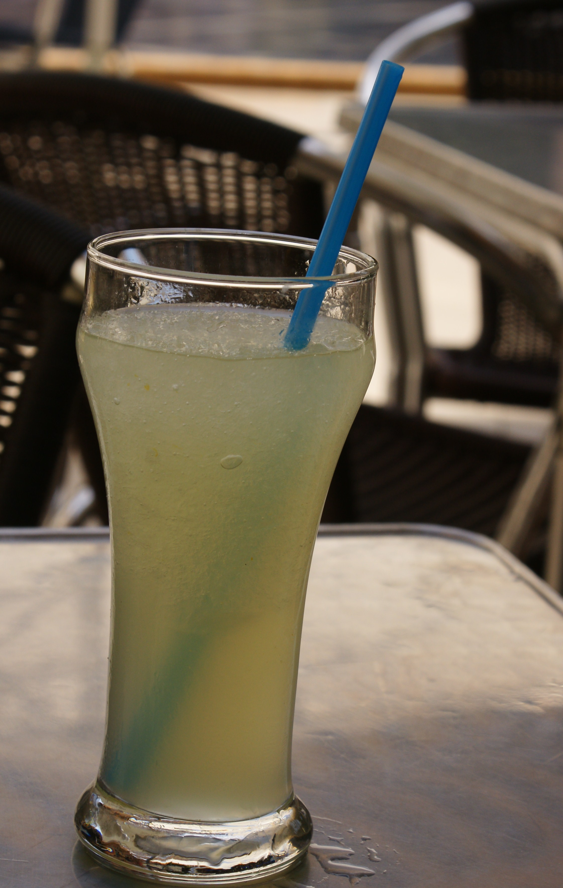 Un vaso de limón granizado, servido en Ciutat Vella (Valencia).